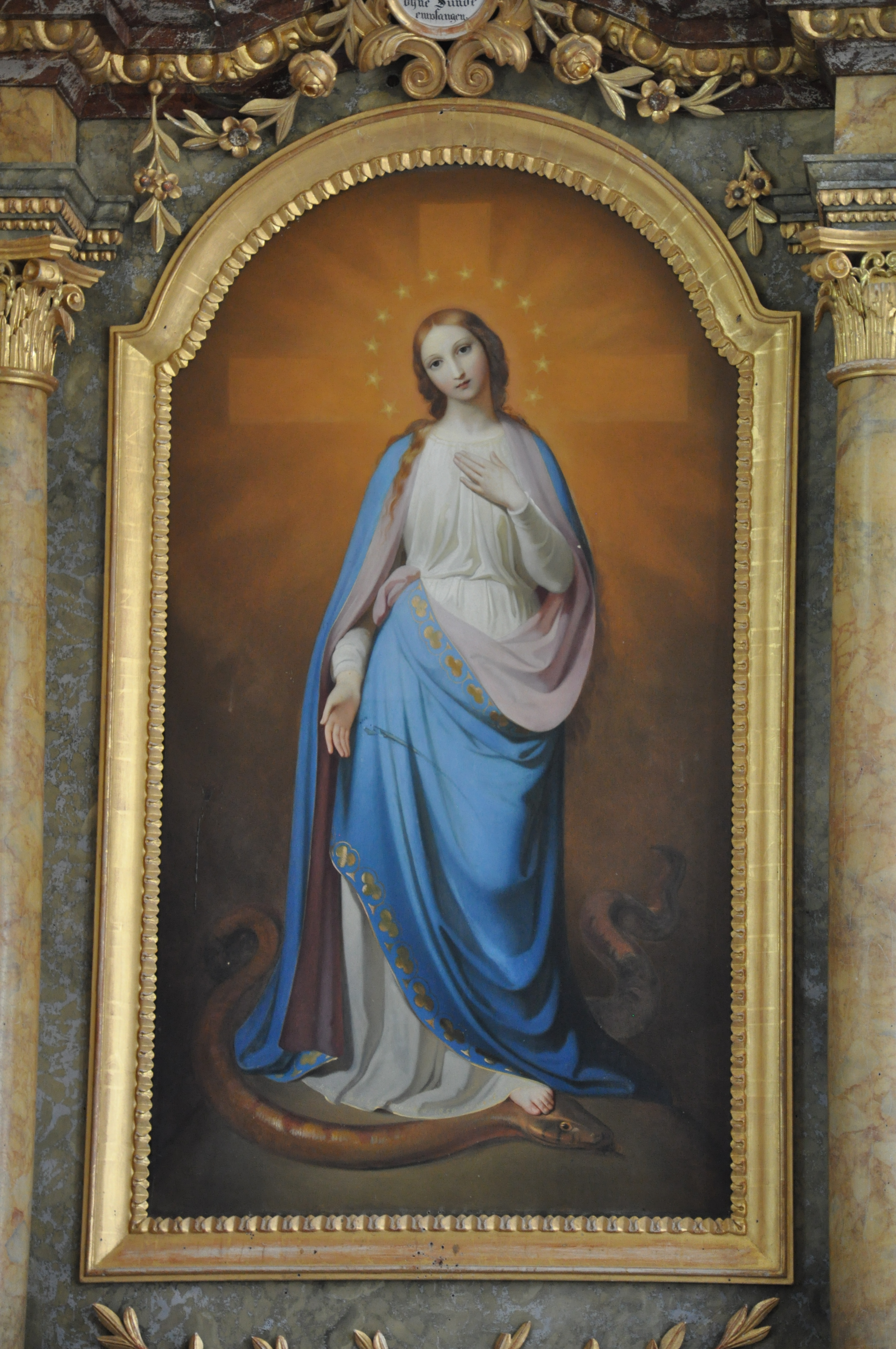 Bildnis der hl. Maria in der Kirche St. Martin in Baad